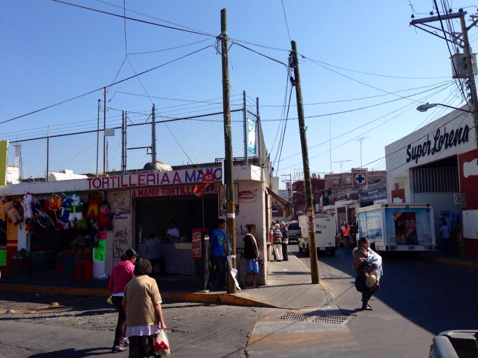 El comercio de diversos productos comestibles y de primera necesidad se realiza en los alrededores del Mercado Municipal de Uriangato "José Dionisio Vallejo"